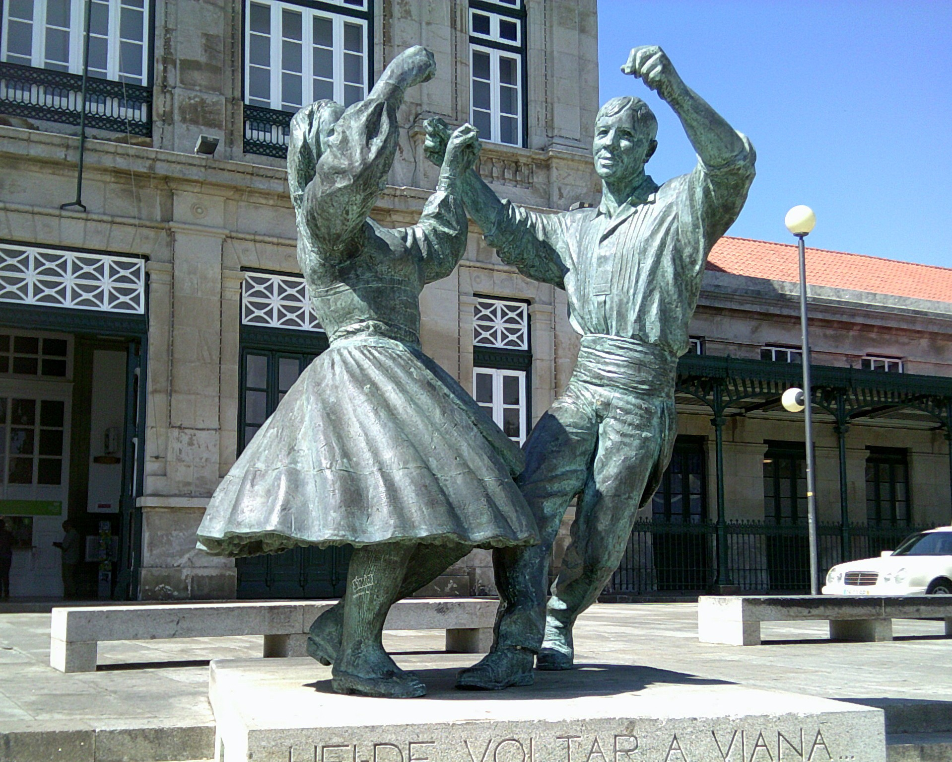 Monumento ao Folclore Vianense, cidade de Viana do Castelo, distrito de Viana do Castelo, Portugal.